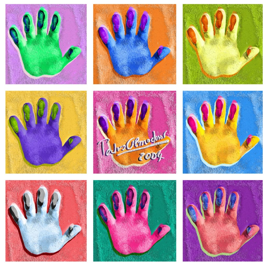 La main de Pedro Almodovar par Gil Zetbase Festival du Film Cannes